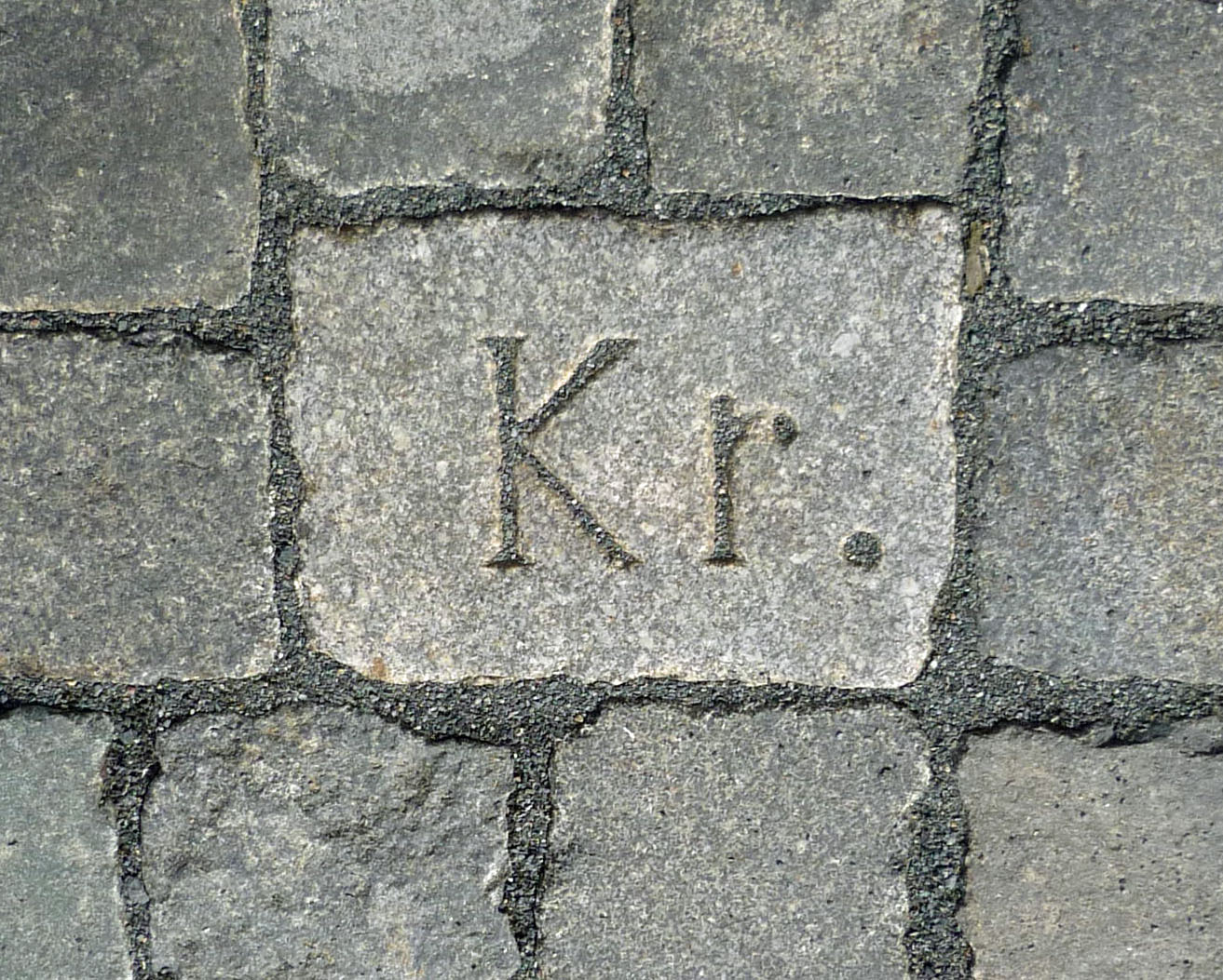 Gedenkstein an die Enthauptung des Kanzlers Krell auf dem Jüdenhof (Neumarkt) in Dresden